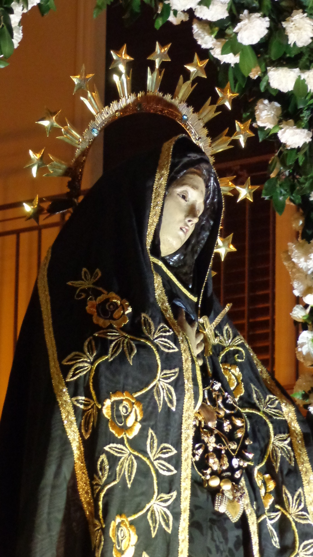 Pasqua 2016 59